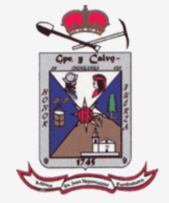 Stemma Guadalupe y Calvo